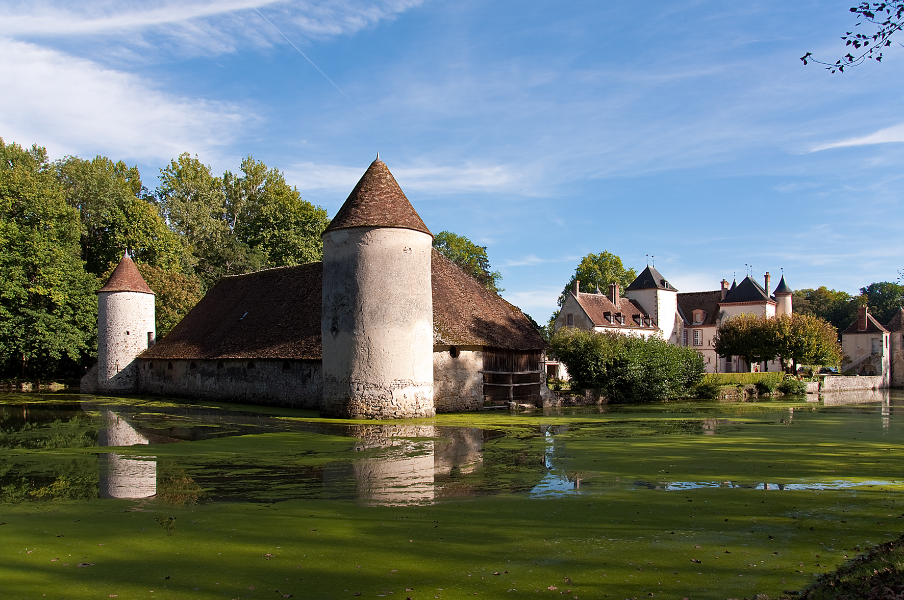 L'arrière du château. Château bien caché dans un petit coin de Seine et Marne.